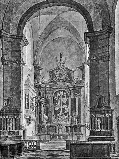 Sankt Gregorius im Elend, Köln. Aquarell um 1840